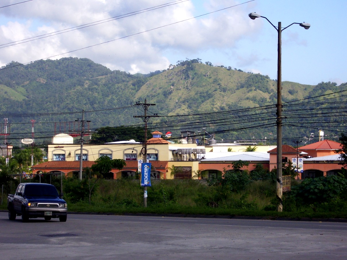 Choloma Carretera Norte